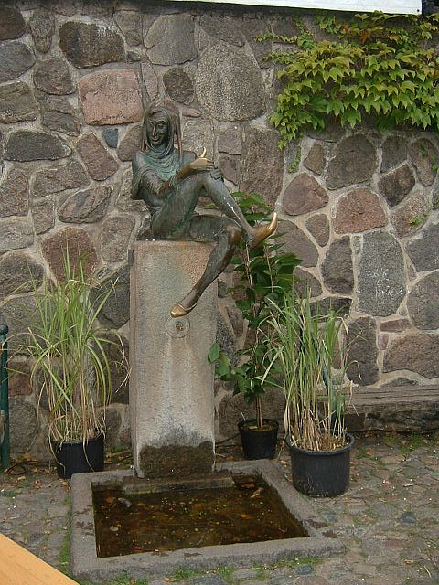 Karlheiz Goedtke (1915-1995): Eulenspiegelbrunnen, 1950, Bronze, Marktplatz Altstadt Mölln, Deutschland. Daumen und Fuß sind blank vom angeblich glücksbringenden Berühren der Passanten